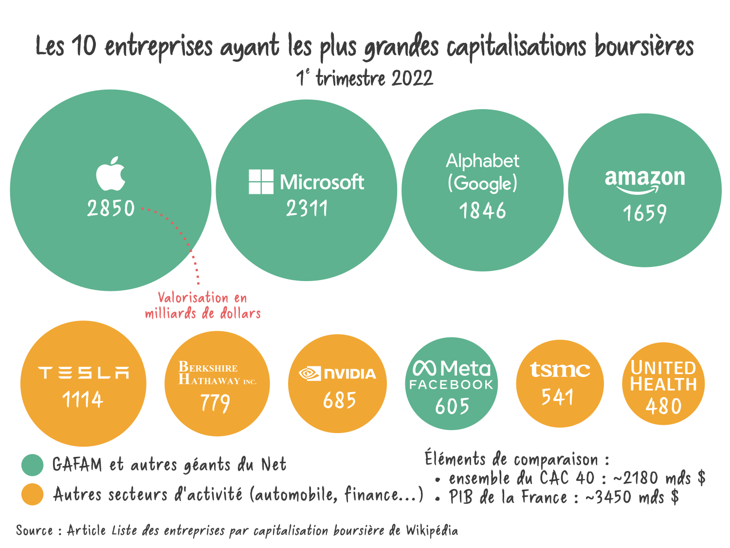 Le poids économique des géants du Net